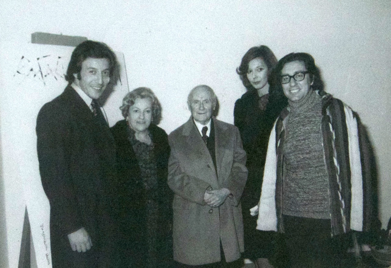 Mario Coppola (sulla destra) e Joan Miro (al centro).